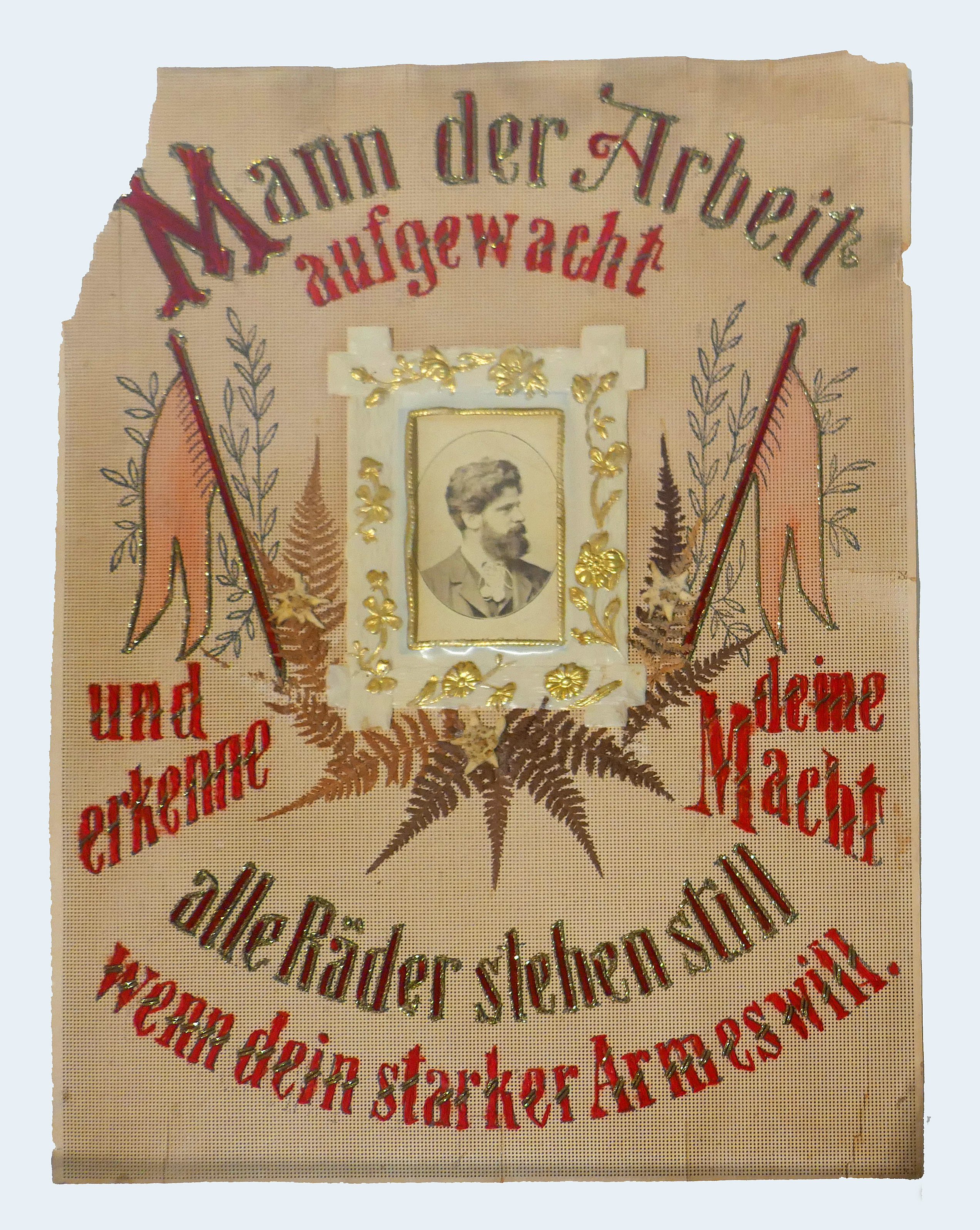 Sozialdemokratische Stickerei, um 1900. In der Mitte ein Bild des jungen Adolf Geck in einem mit goldenen Blumen verzierten Papierrahmen, rechts und links jeweils eine rote Fahne und pflanzlichen Applikationen. Georg Herwegh hat dieses Lied 1863 anlässlich der Gründung des Allgemeinen Deutschen Arbeitervereins geschrieben, aus dem später die SPD aufging.. Museum im Ritterhaus (Offenburg).